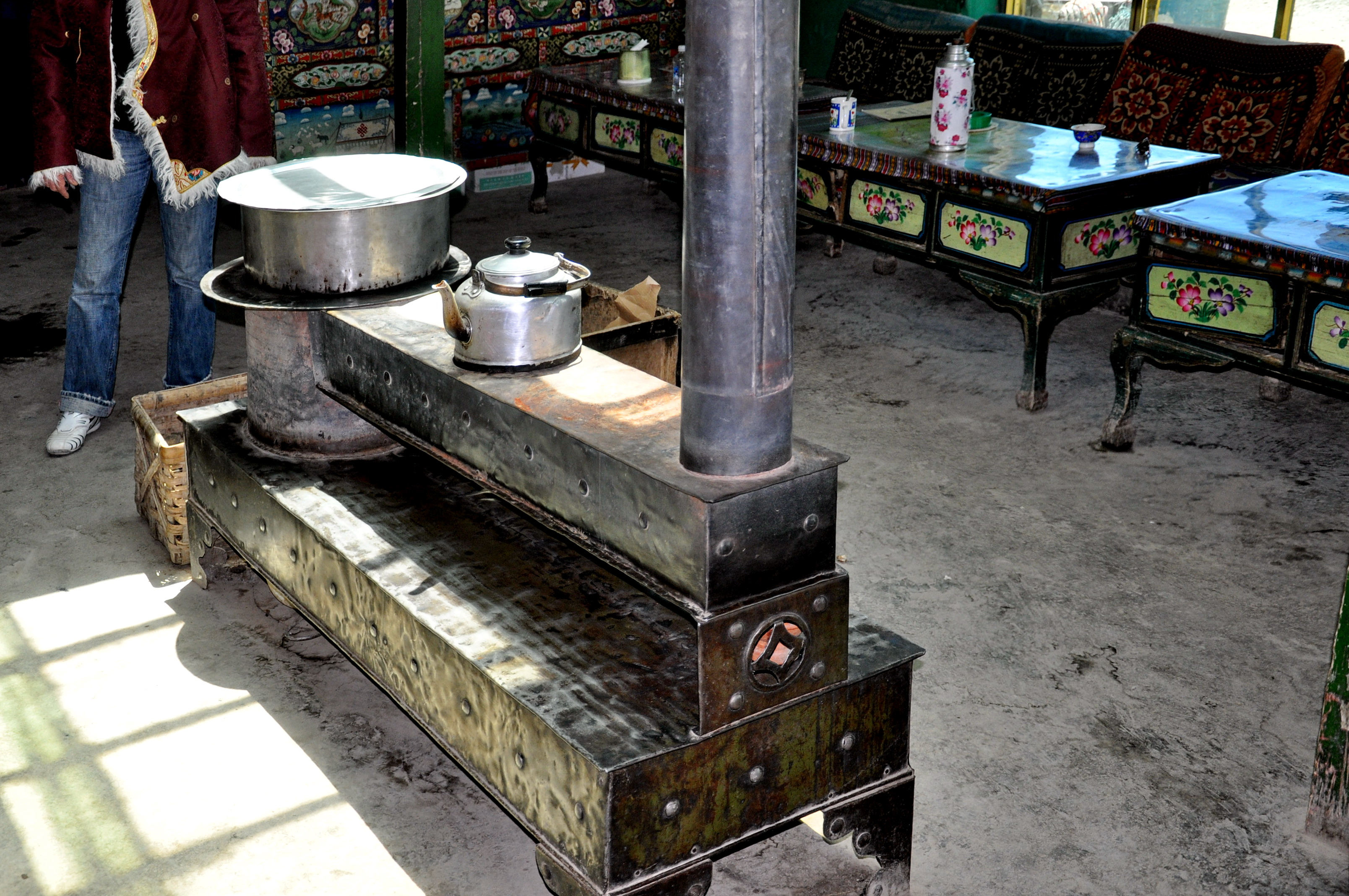 poèle à boulettes de bouse de yak (Tibet)